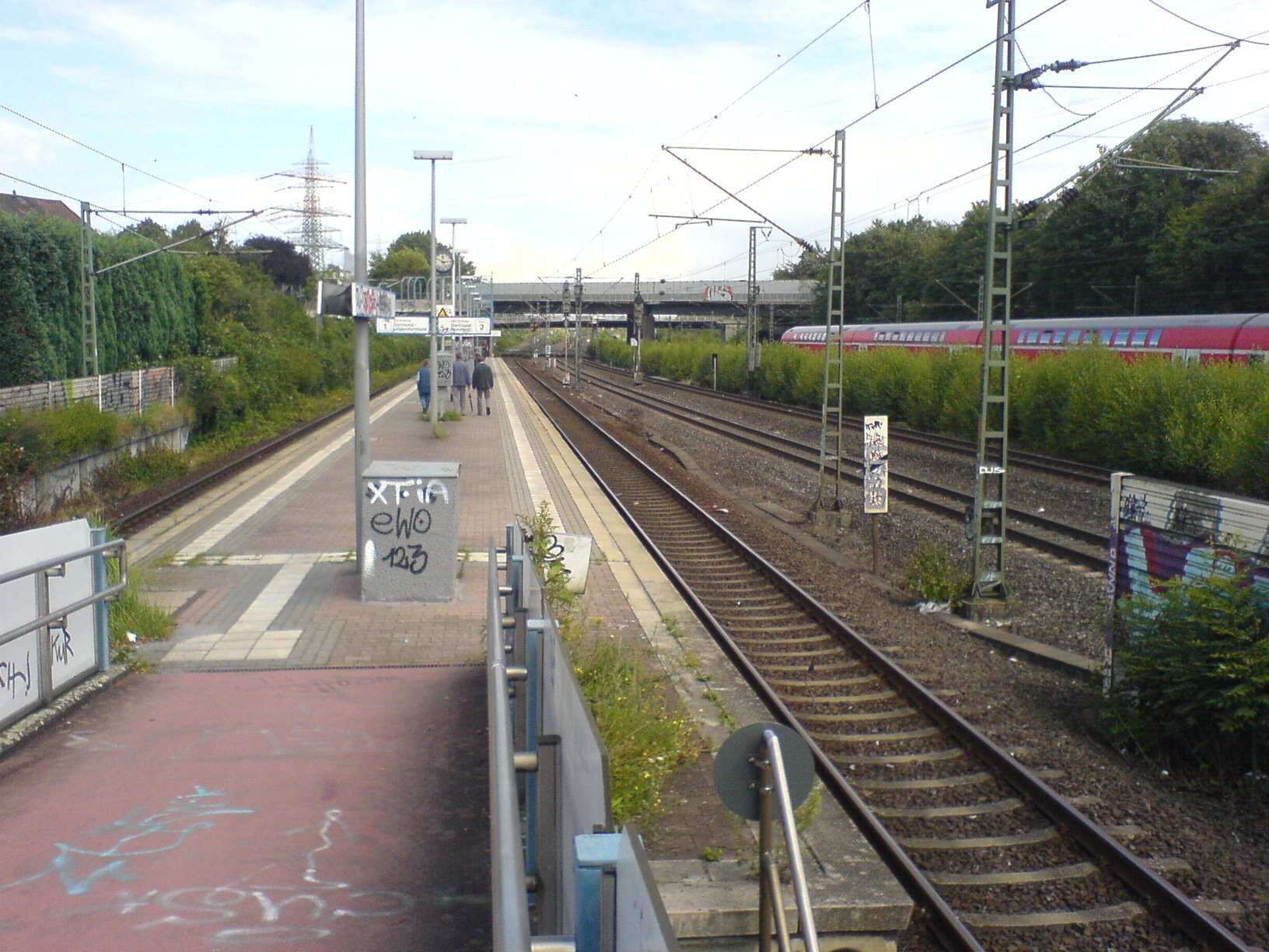 Bahnhof Dortmund-Marten Süd, im Hintergrund die A45